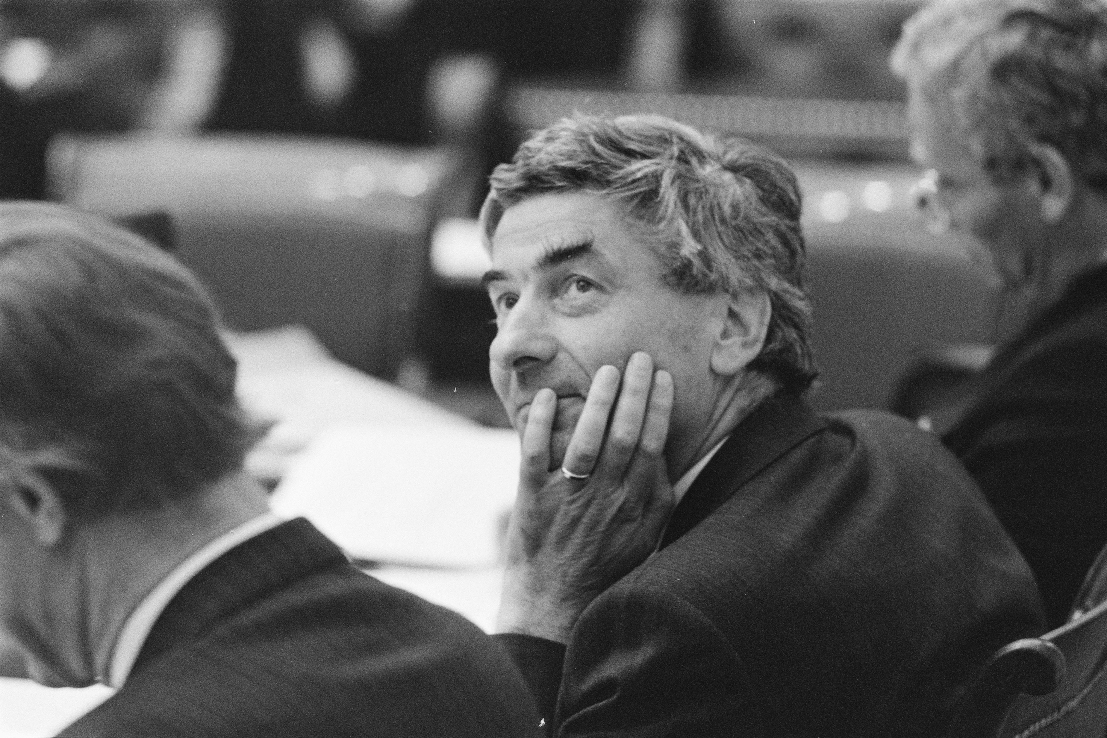 Collectie / Archief : Fotocollectie Anefo Reportage / Serie : Debat over Koeweit in de Tweede Kamer Beschrijving : Premier Ruud Lubbers Datum : 29 juni 1989 Locatie : Den Haag, Zuid-Holland Trefwoorden : debatten, politiek, premiers Persoonsnaam : Lubbers, Ruud Fotograaf : Croes, Rob C. / Anefo Auteursrechthebbende : Nationaal Archief Materiaalsoort : Negatief (zwart/wit) Nummer archiefinventaris : bekijk toegang 2.24.01.05 Bestanddeelnummer : 934-4765